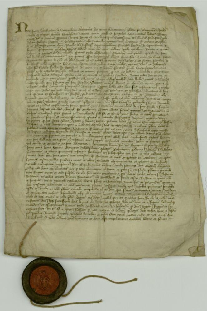 Potwierdzenie traktatu mełneńskiego między Polską a Zakonem z dnia 8 XII 1423 roku